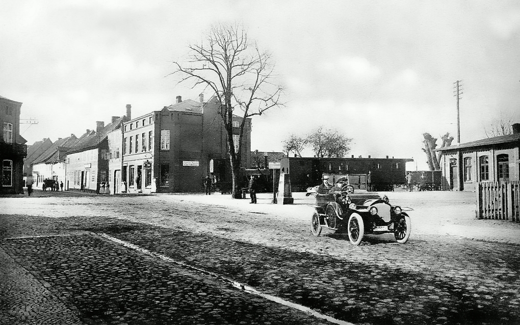 Am Stadbahnhof